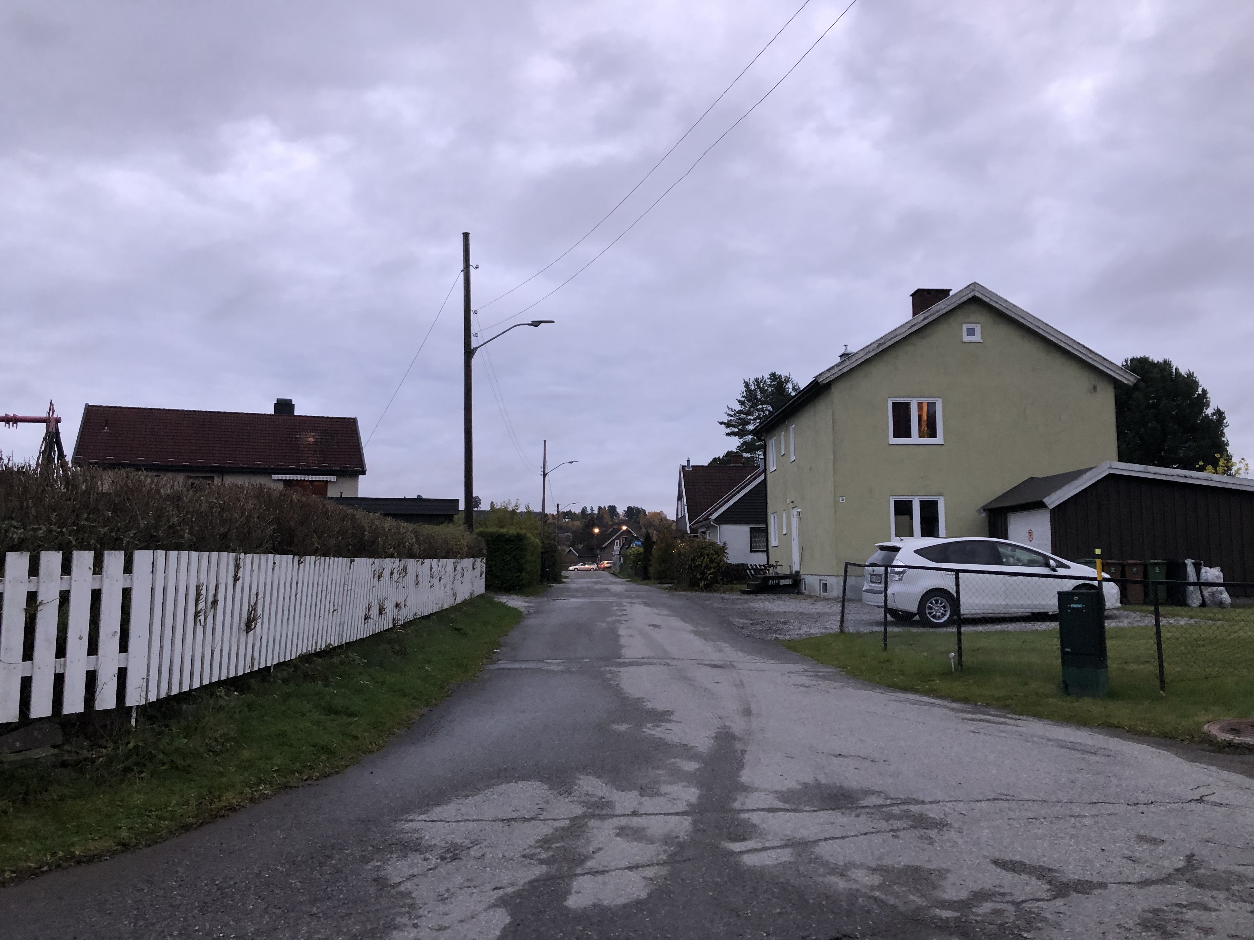 Grensegata i Hønefoss, sett fra Tordenskiolds gate.